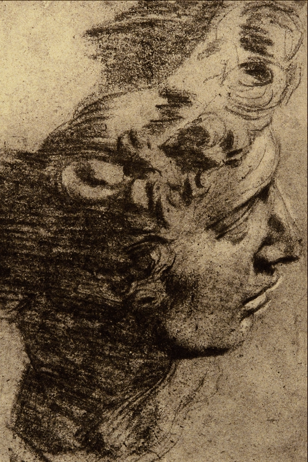 Studio di una Scultura